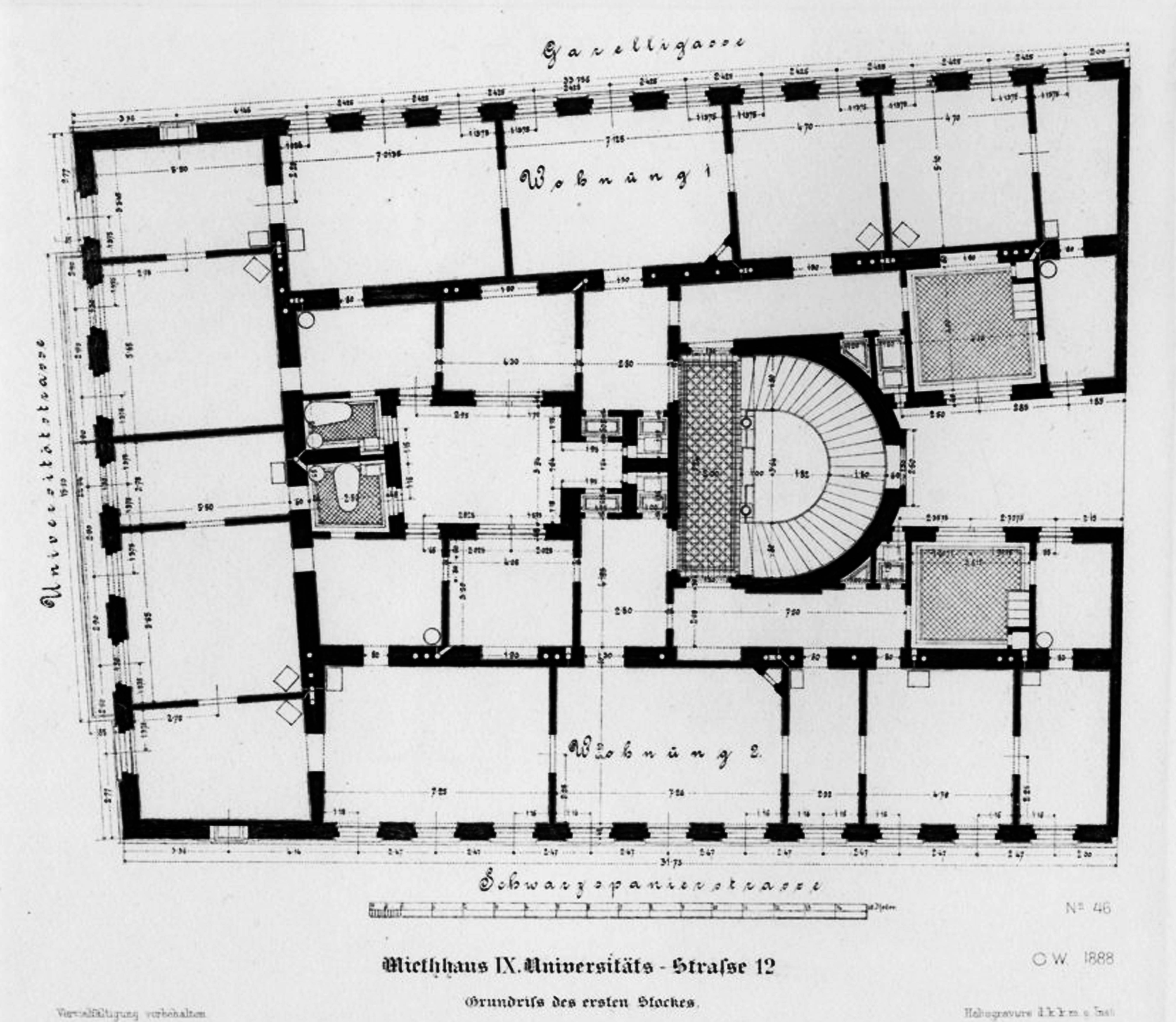 Будинок на Універзітетсштрасе. Відень. План.